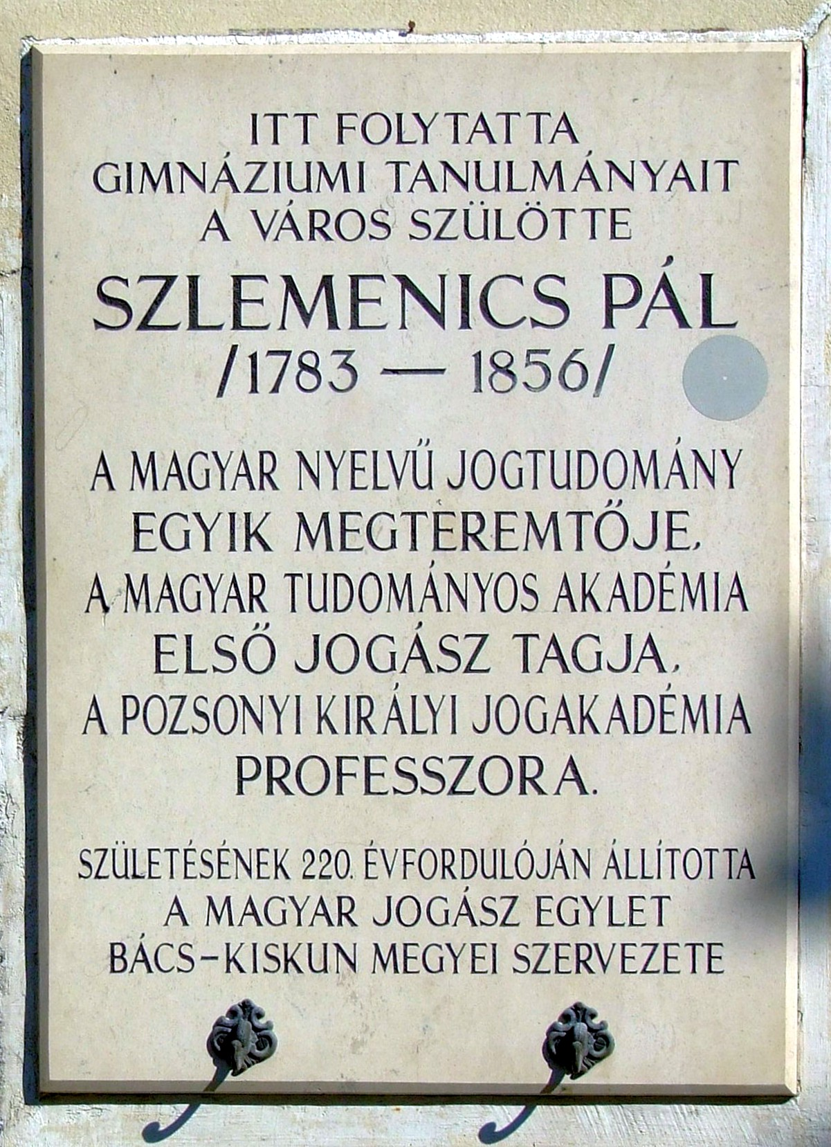 Szlemenics Pál-emléktábla a kecskeméti piarista rendház falán